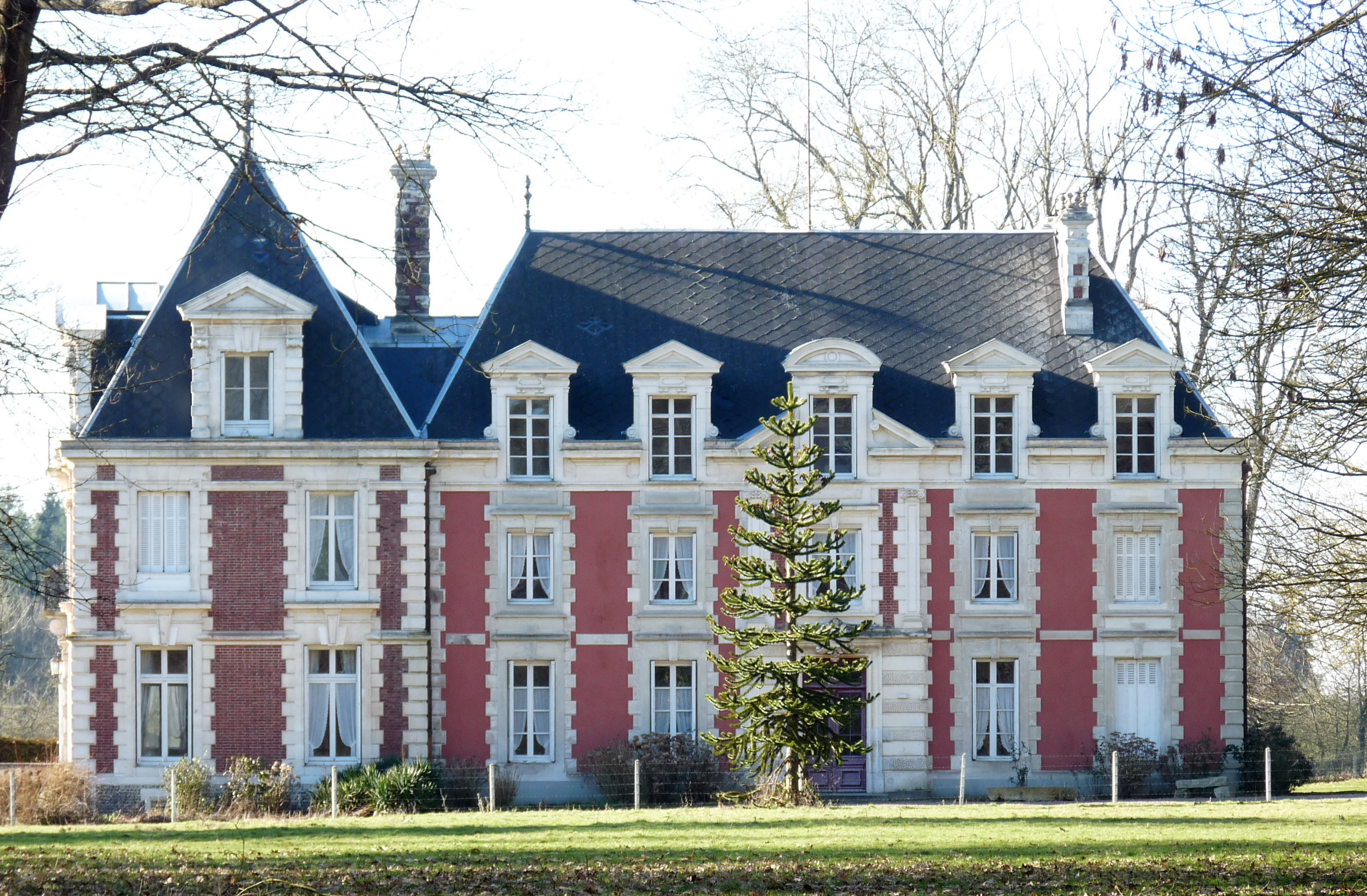 Manoir du Grand-Feugueray